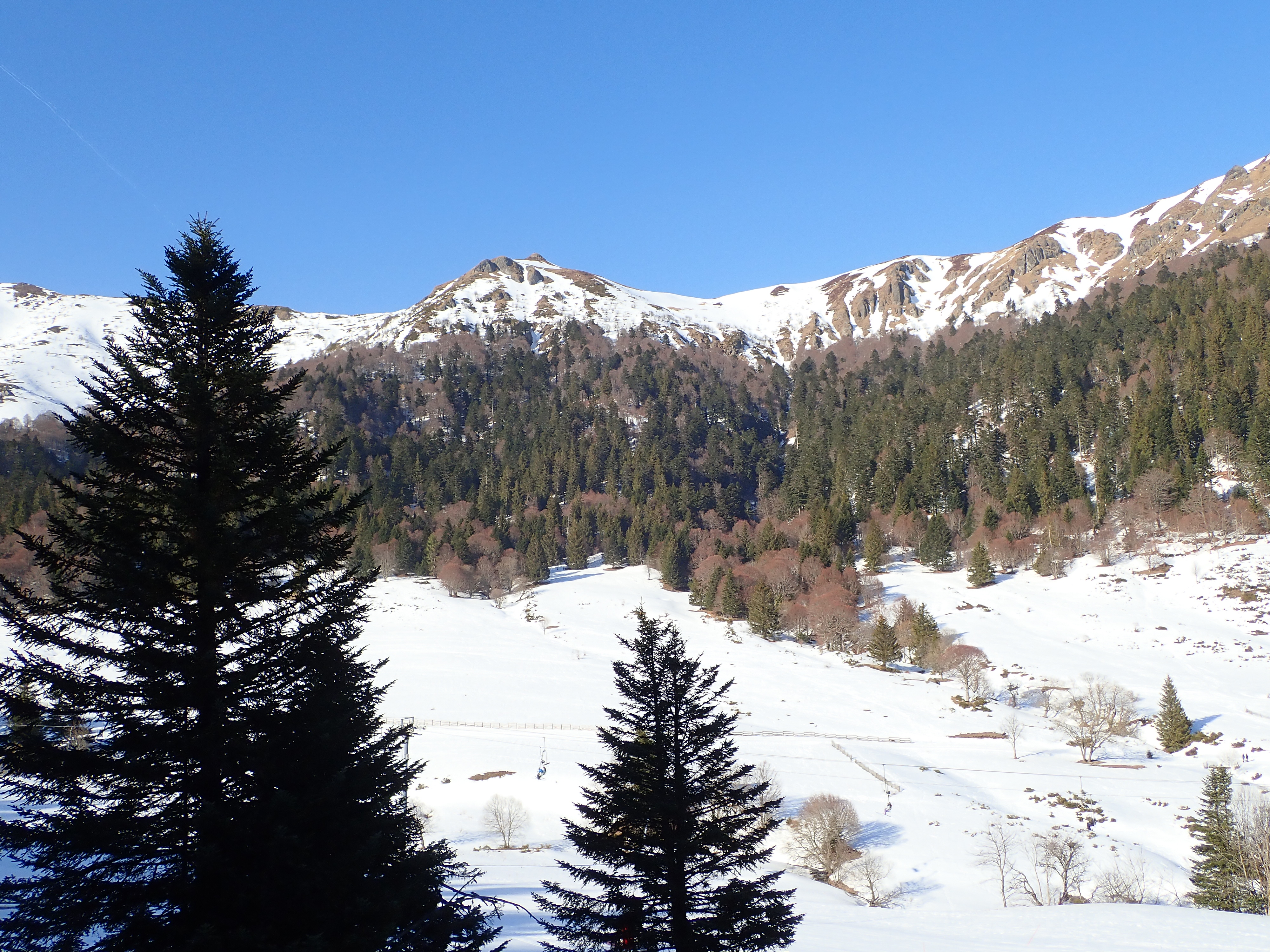 Cirque de Font d'Alagnon dans les monts du Cantal (Auvergne) non loin de la station du Lioran.